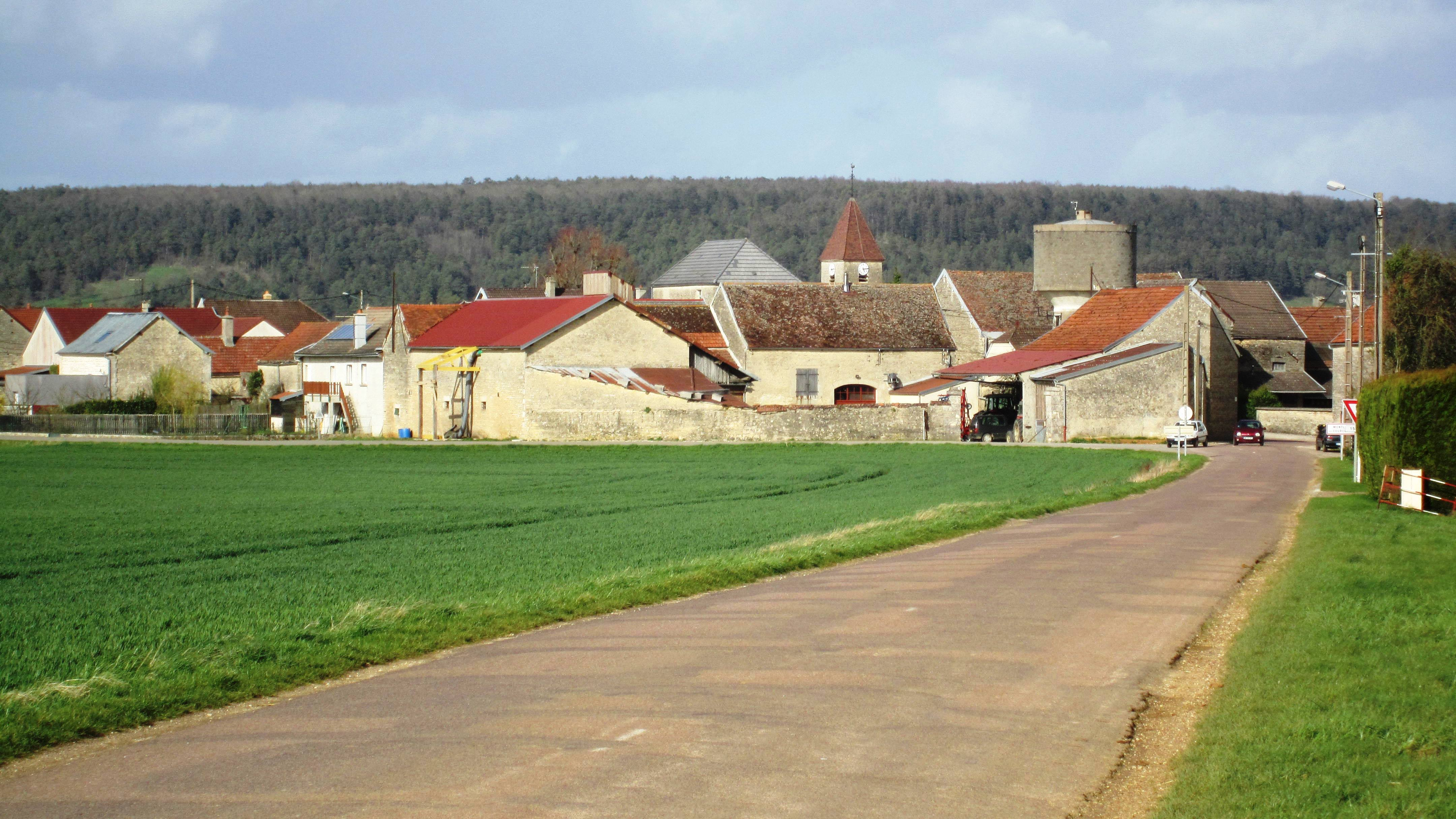 Entrée ouest du village de Montliot (Côte-d'Or)